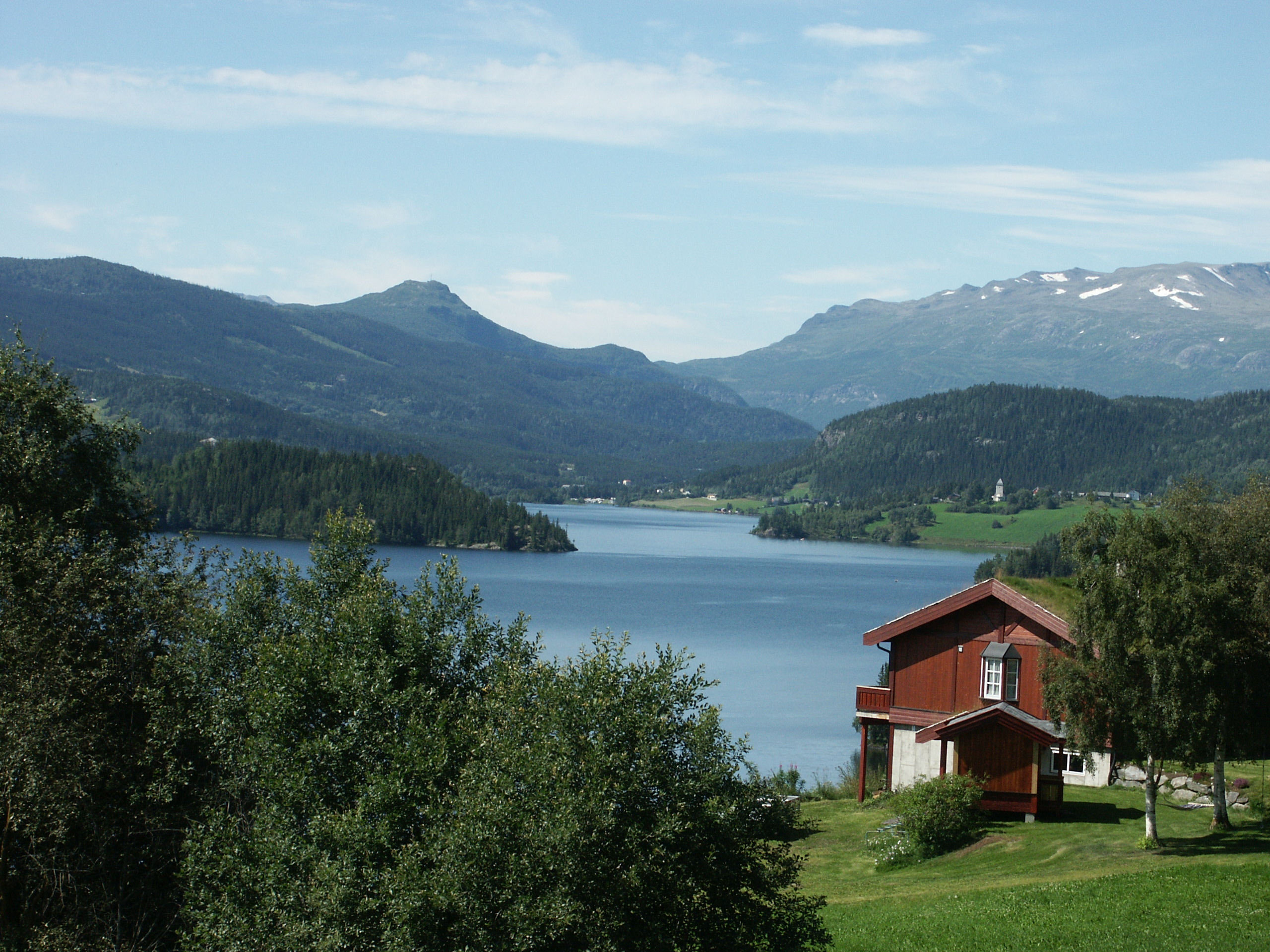 Slidrefjorden. Kyrkja er Lomen kyrkje